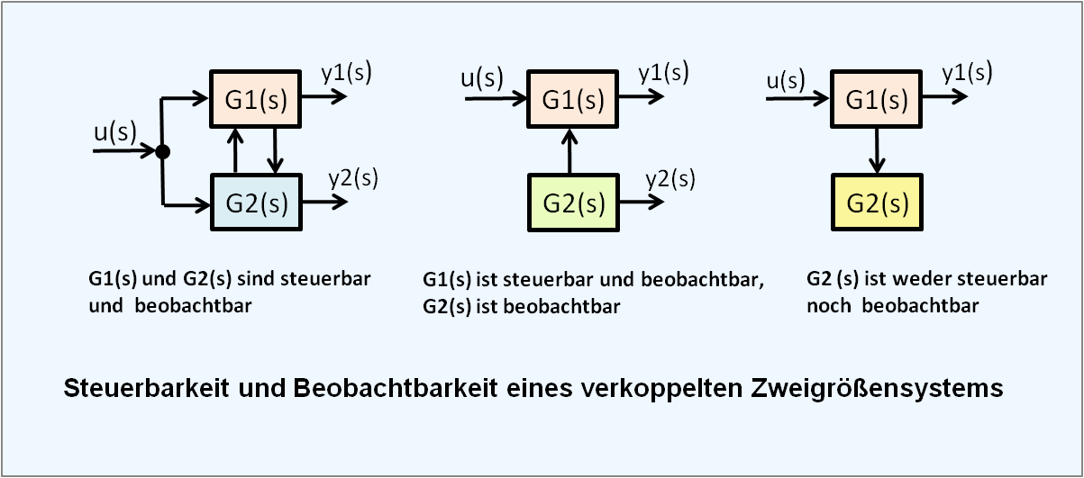 Blockschaltbild von Übertragungssystemen zur Darstellung der Steuerbarkeit und Beobachtbarkeit